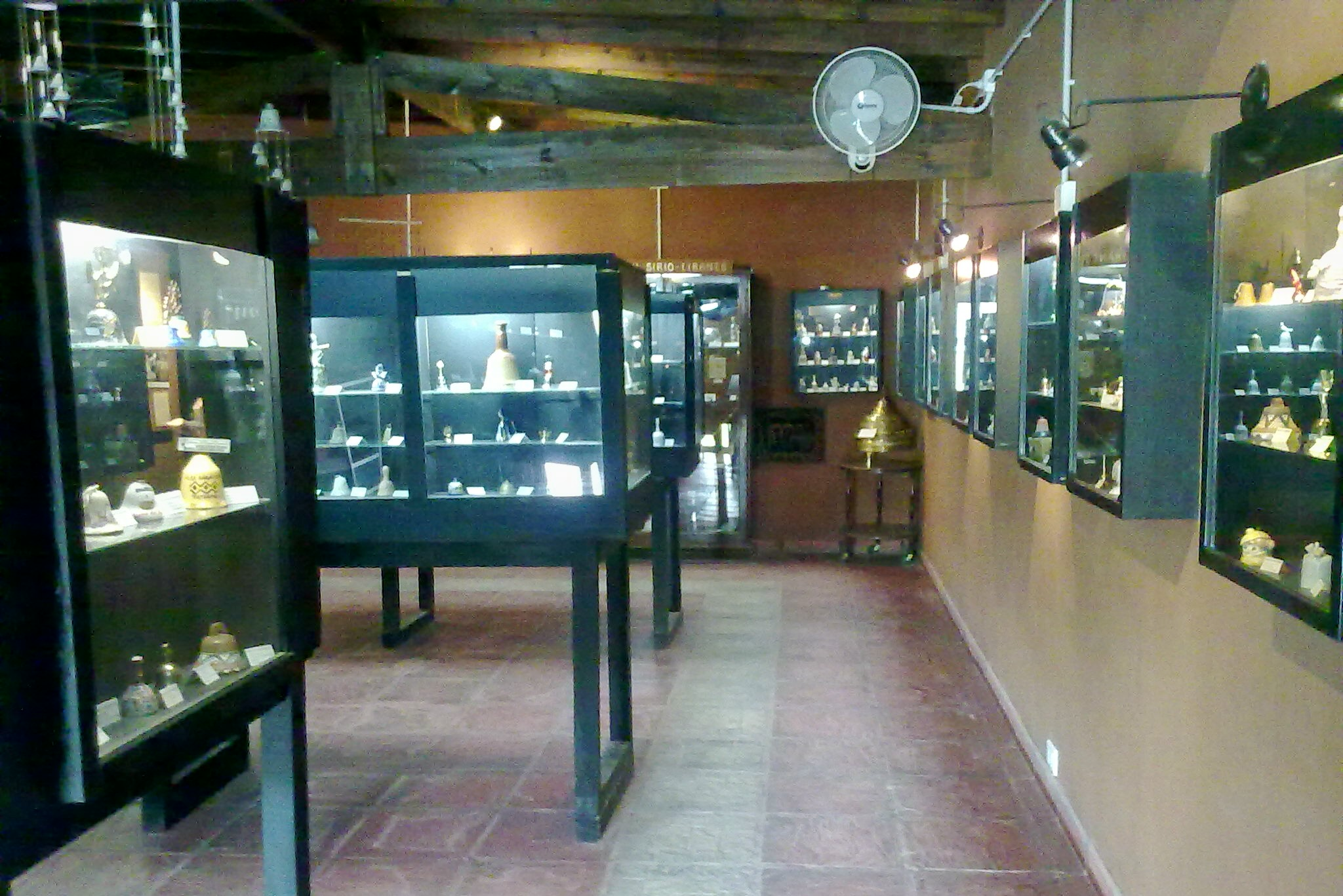 Interior del Museo de las Campanas en Mina Clavero, Córdoba, Argentina.